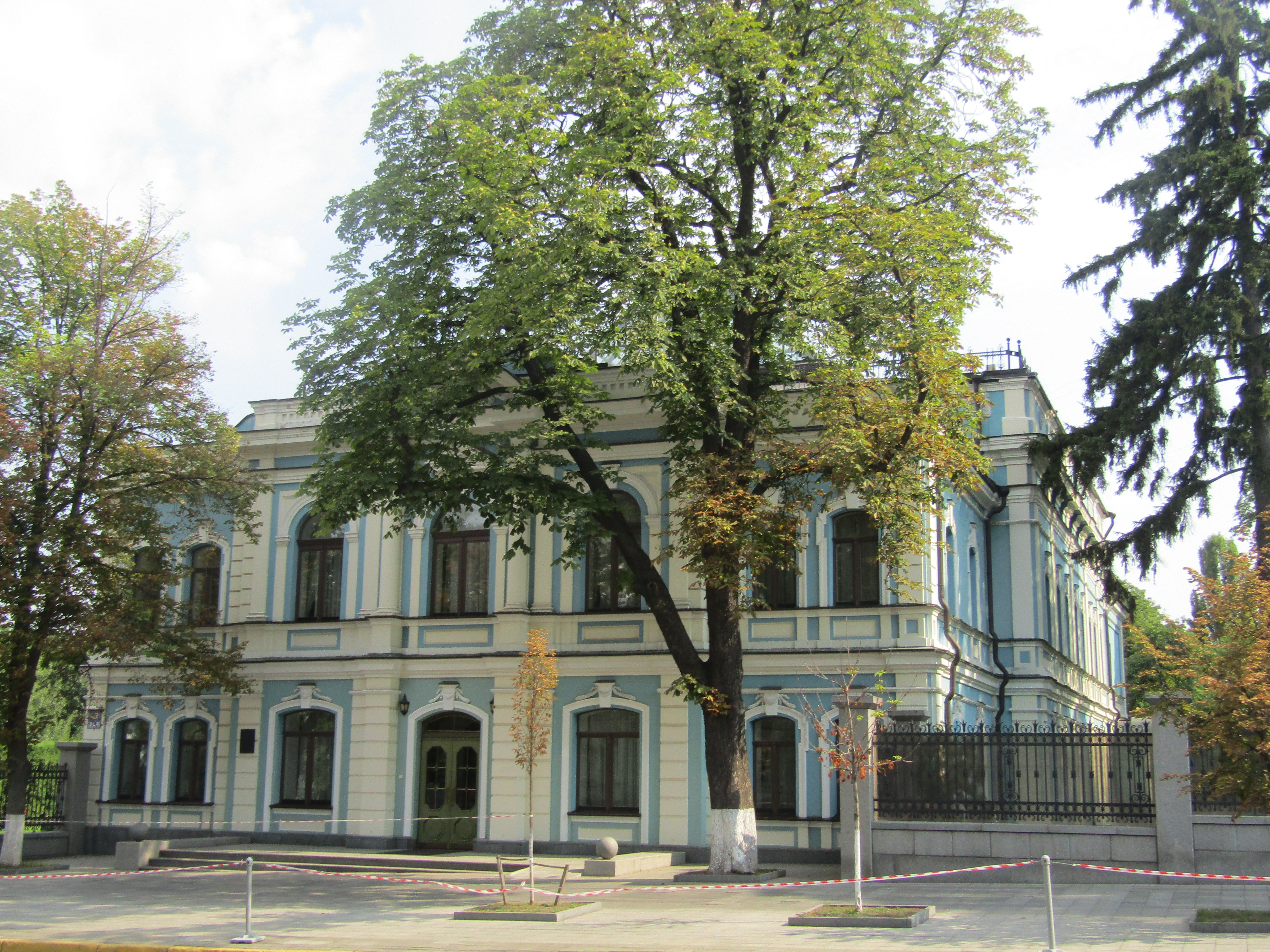 Будинок біржі, Київ, Інститутська вул., 7